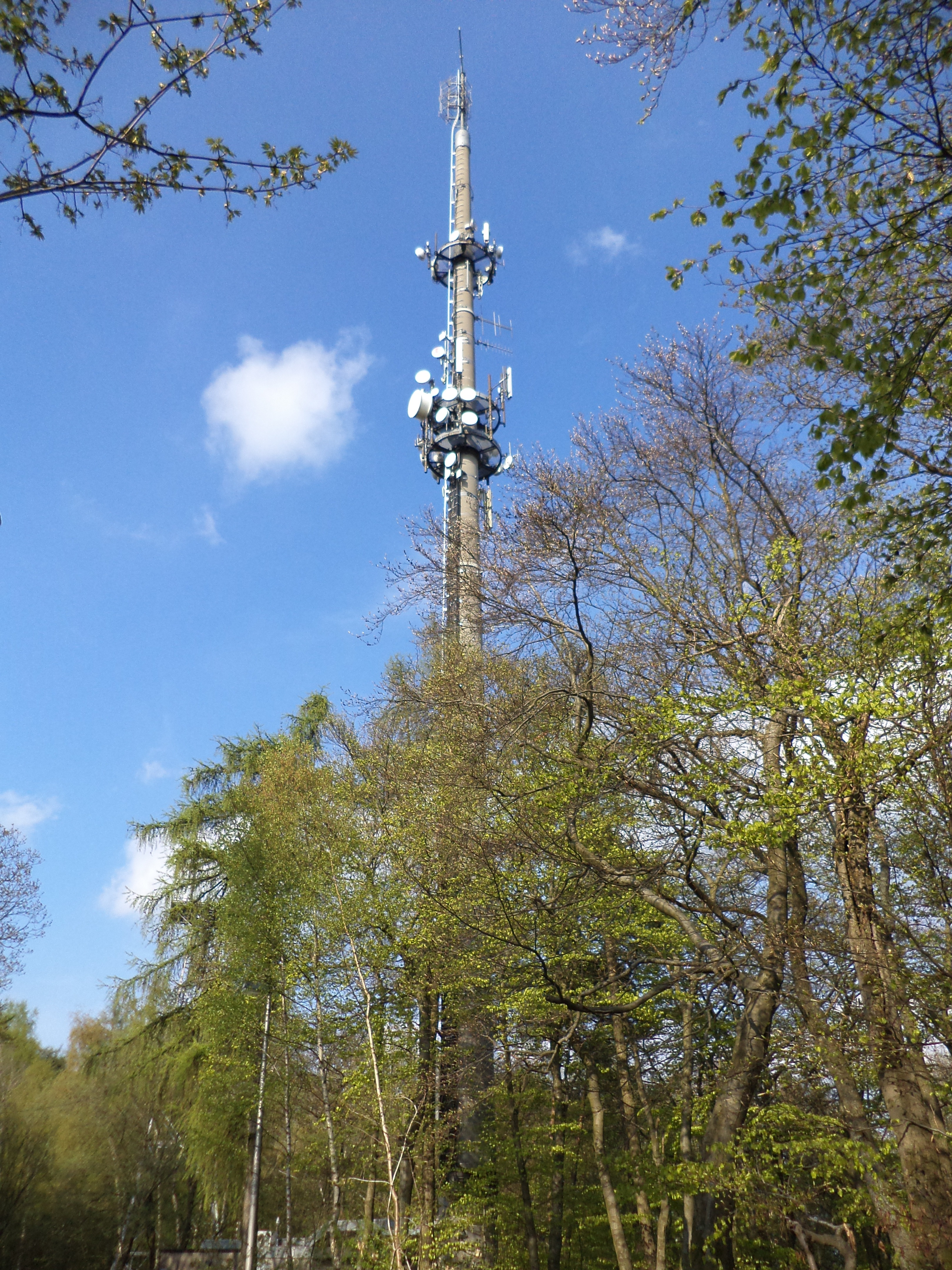 Der Fertigbetonturm des Senders Hahnenkamm bei Alzenau